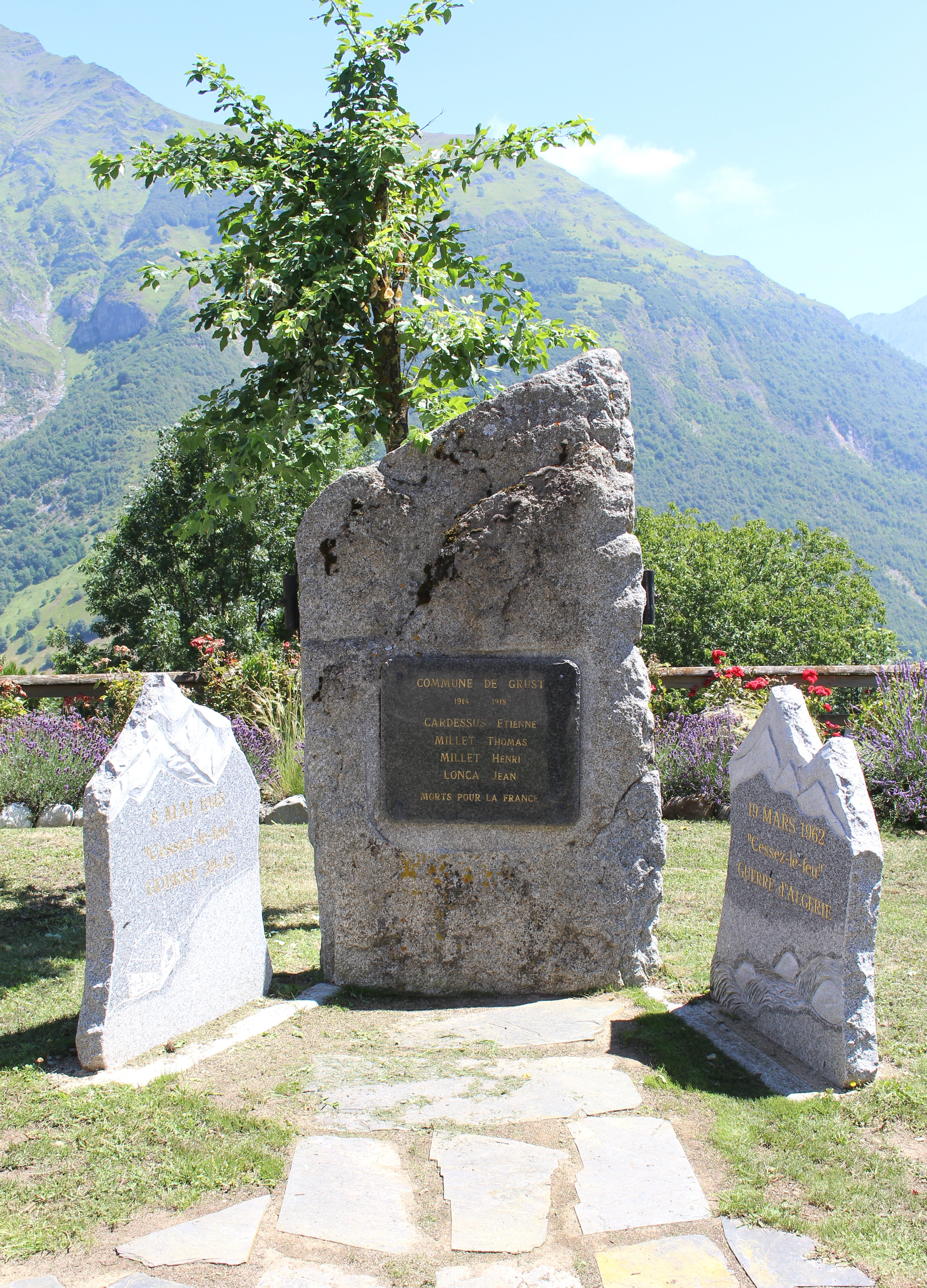 Monument aux morts de Grust (Hautes-Pyrénées)